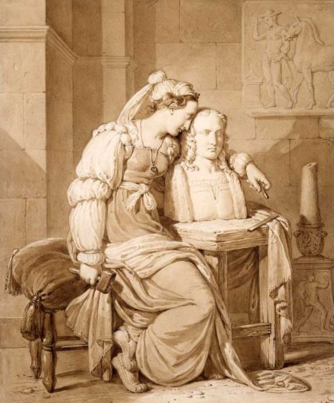 lavis de sépia